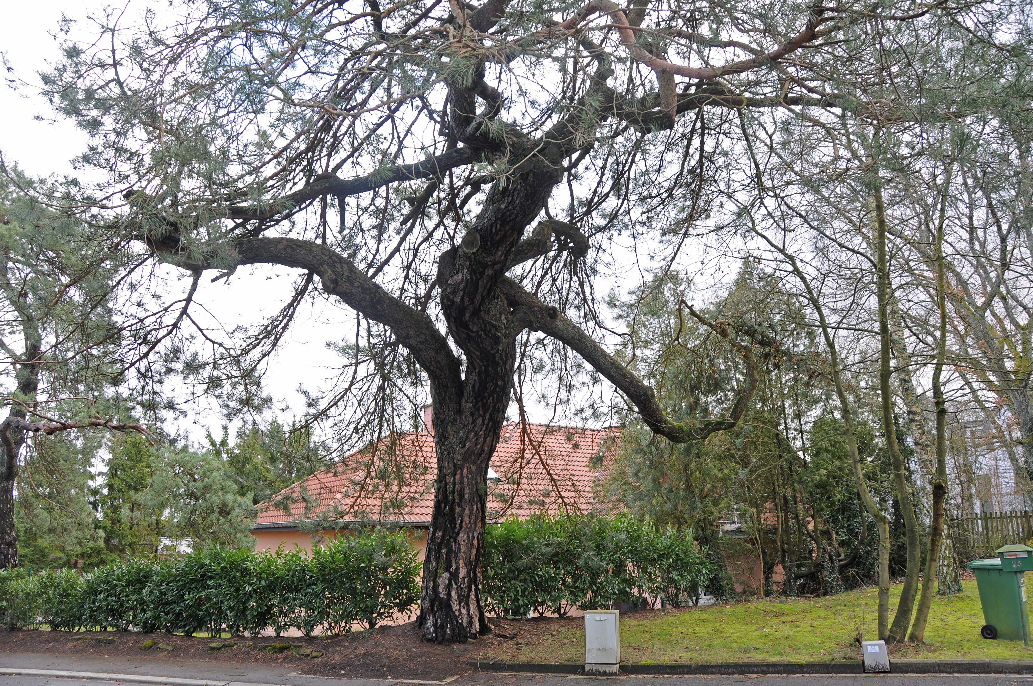 Kifer um Briddel.